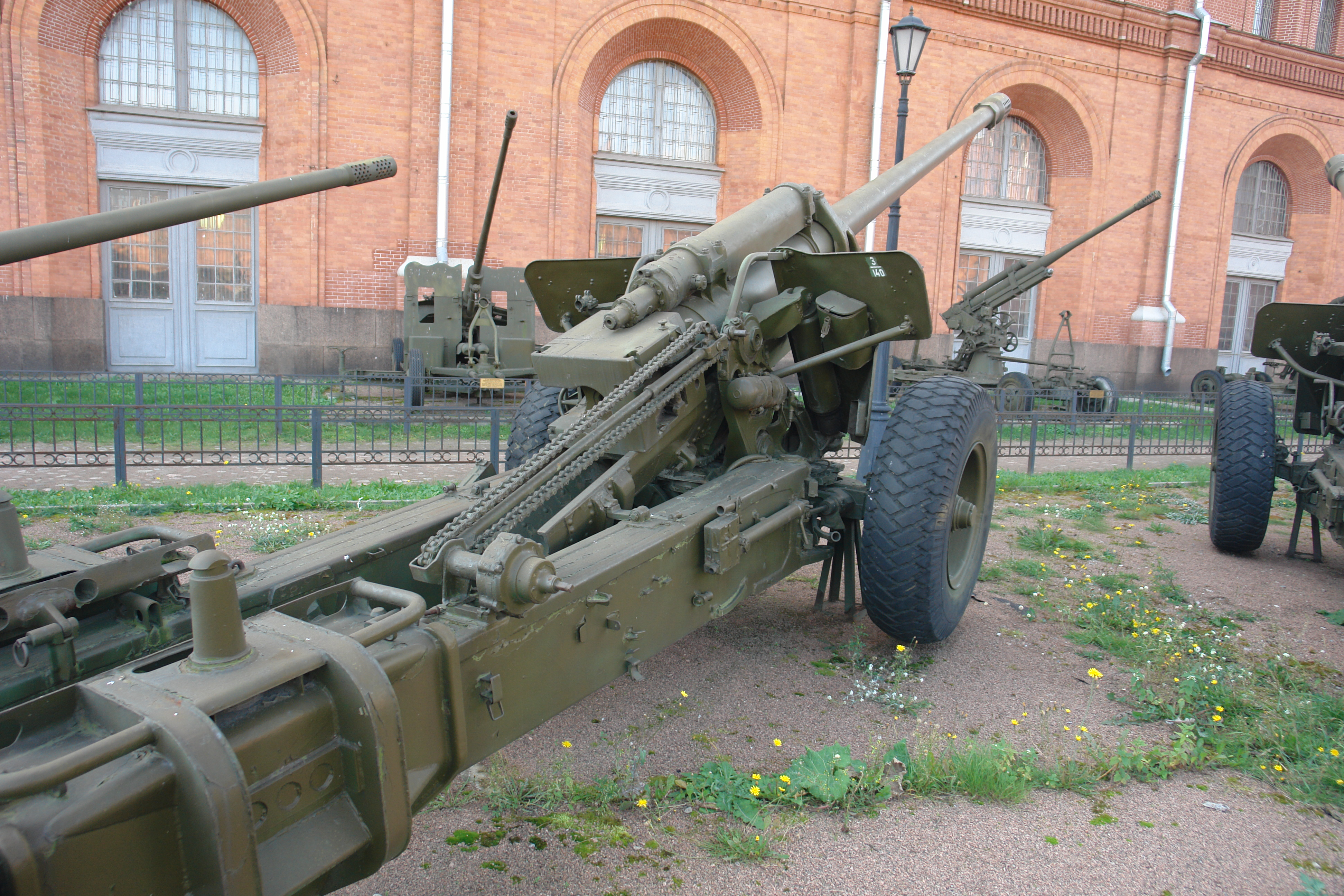 130-мм пушка М-46 (1953) Военно-исторический музей артиллерии, инженерных войск и войск связи, Санкт-Петербург.